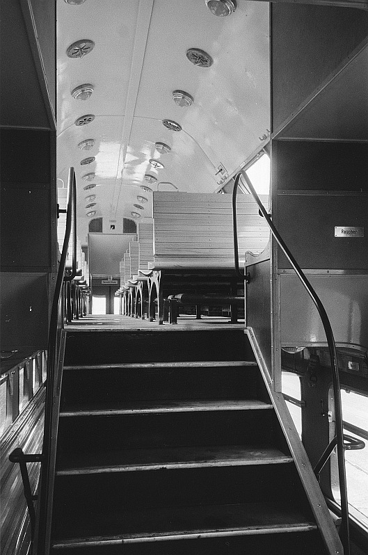 Original image description from the Deutsche Fotothek Innenansicht des oberen Abteils eines Doppelstockwagens